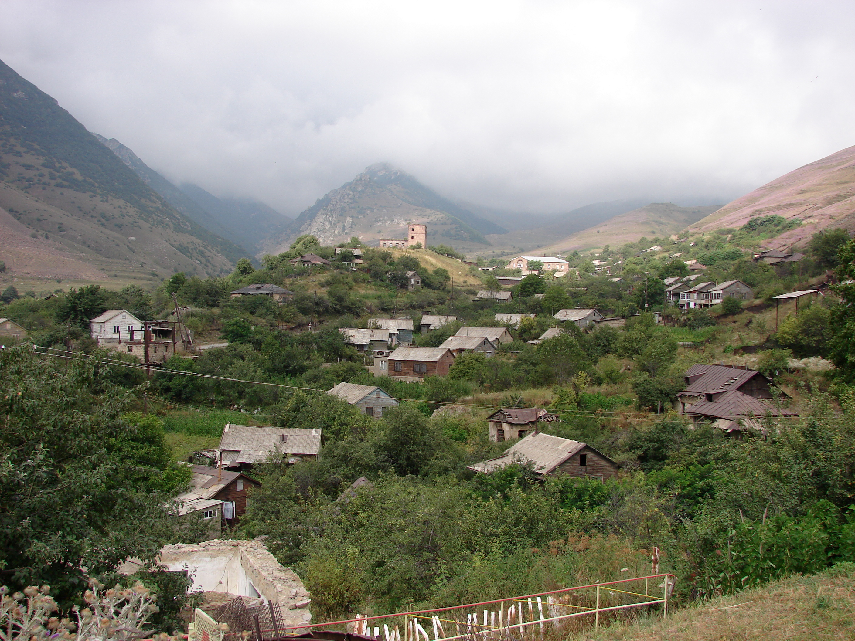 Գյուղ Քաջարան, Սյունիքի մարզ